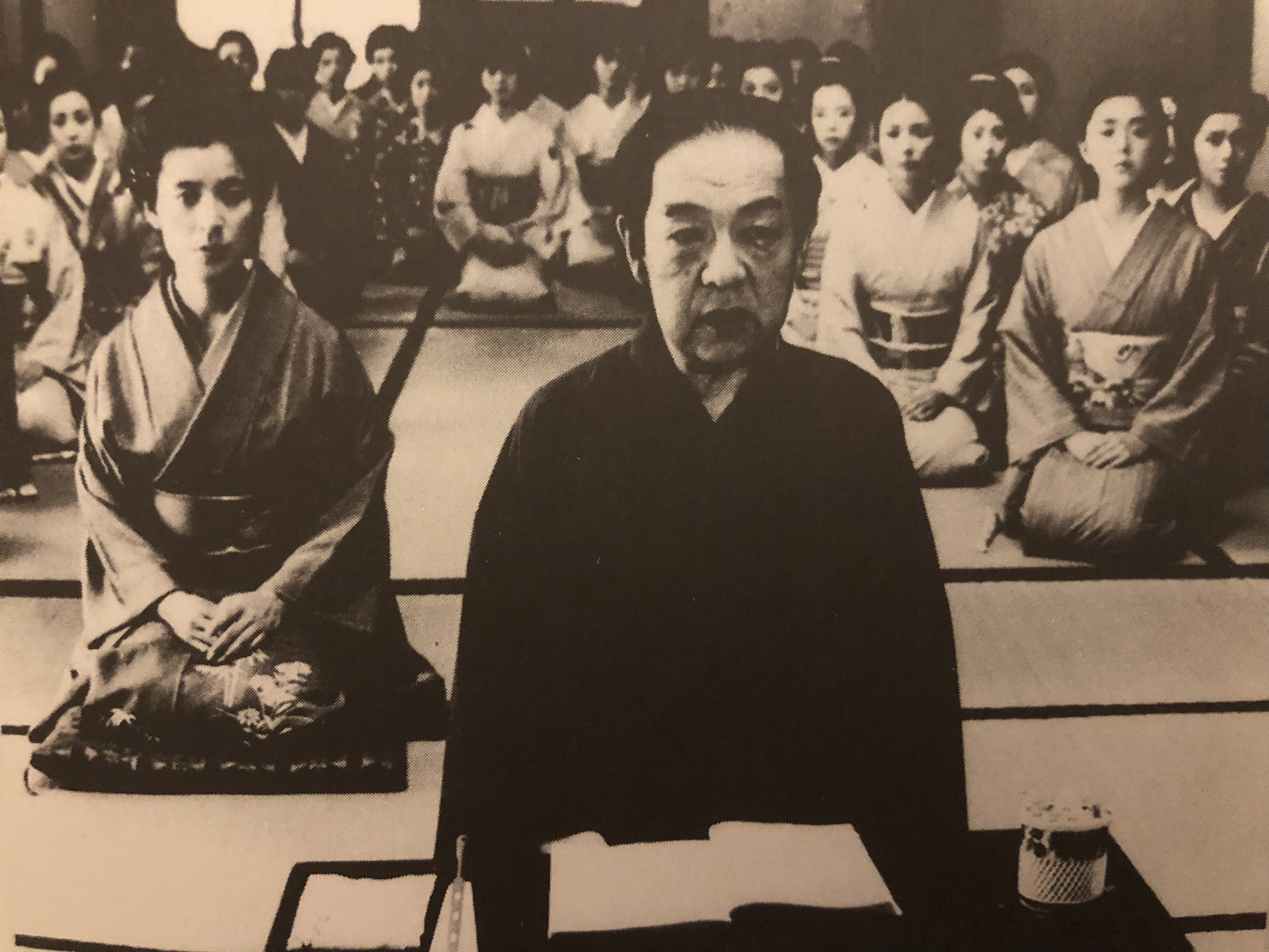 撮影時